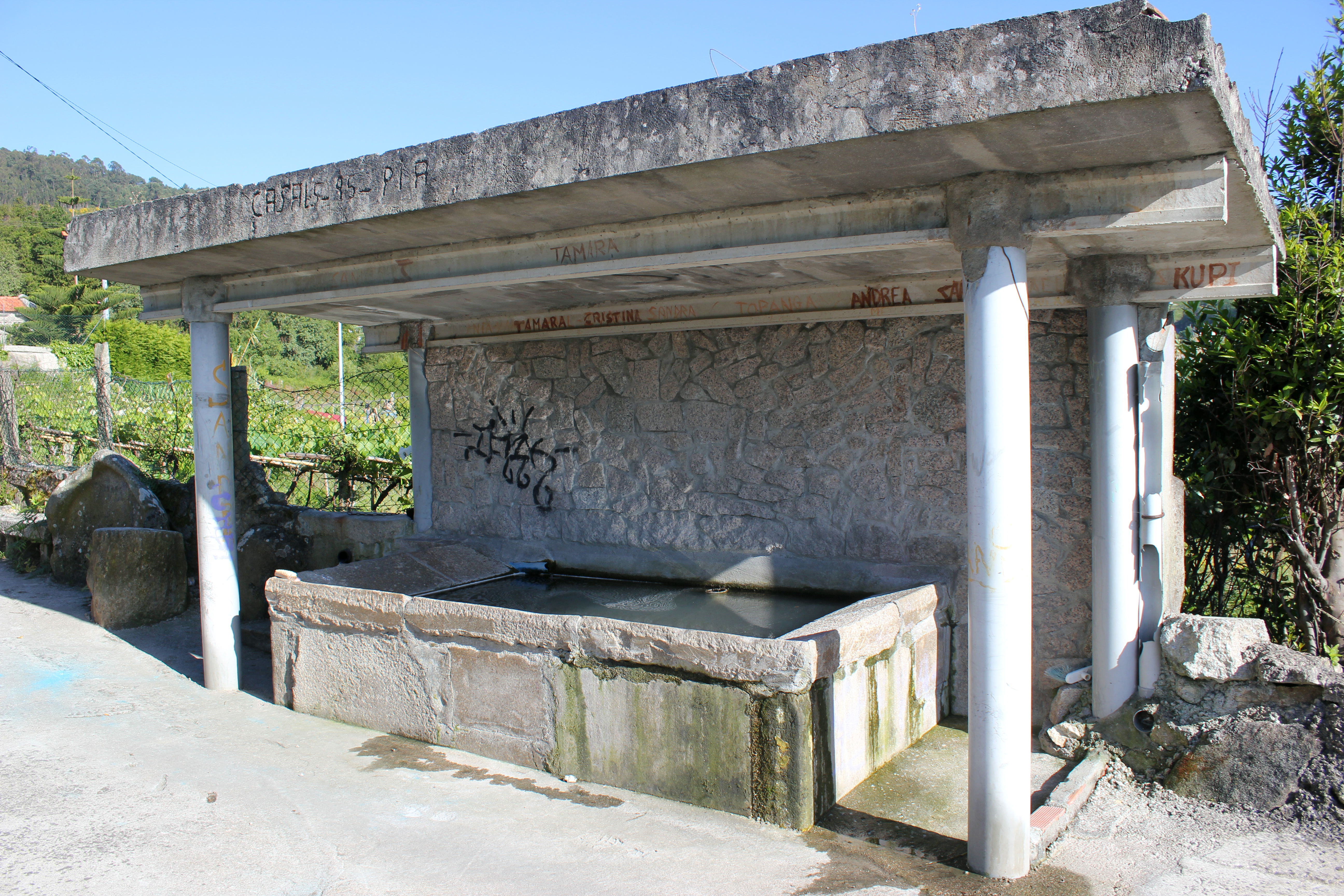 Lavadoiro do Casal, en Marín